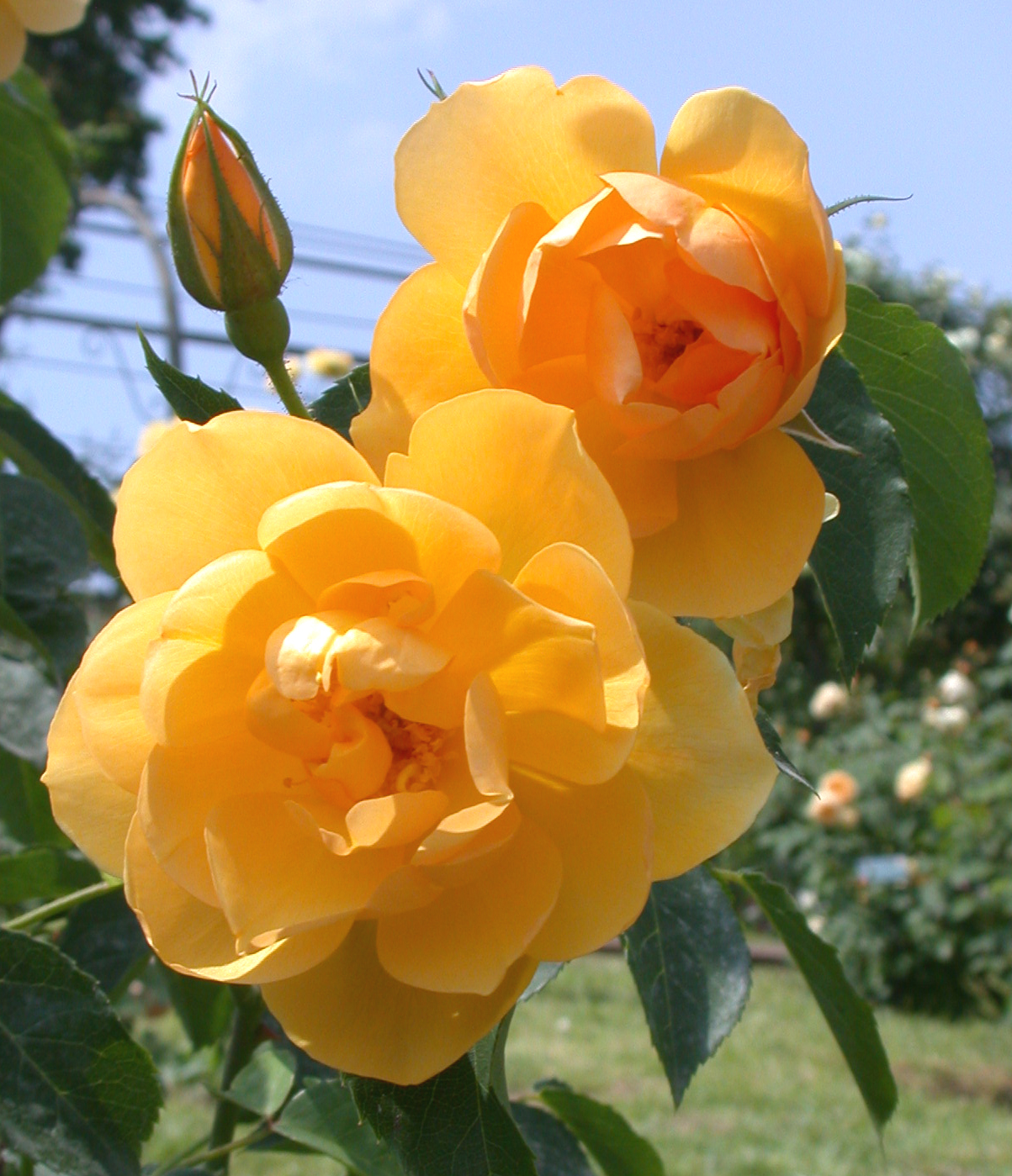 Roma Roseto comunale, Rosa Buttercup, Davin Austin 1999 (Inghilterra) EN-B2 / V-A INGL (6-05-2006)